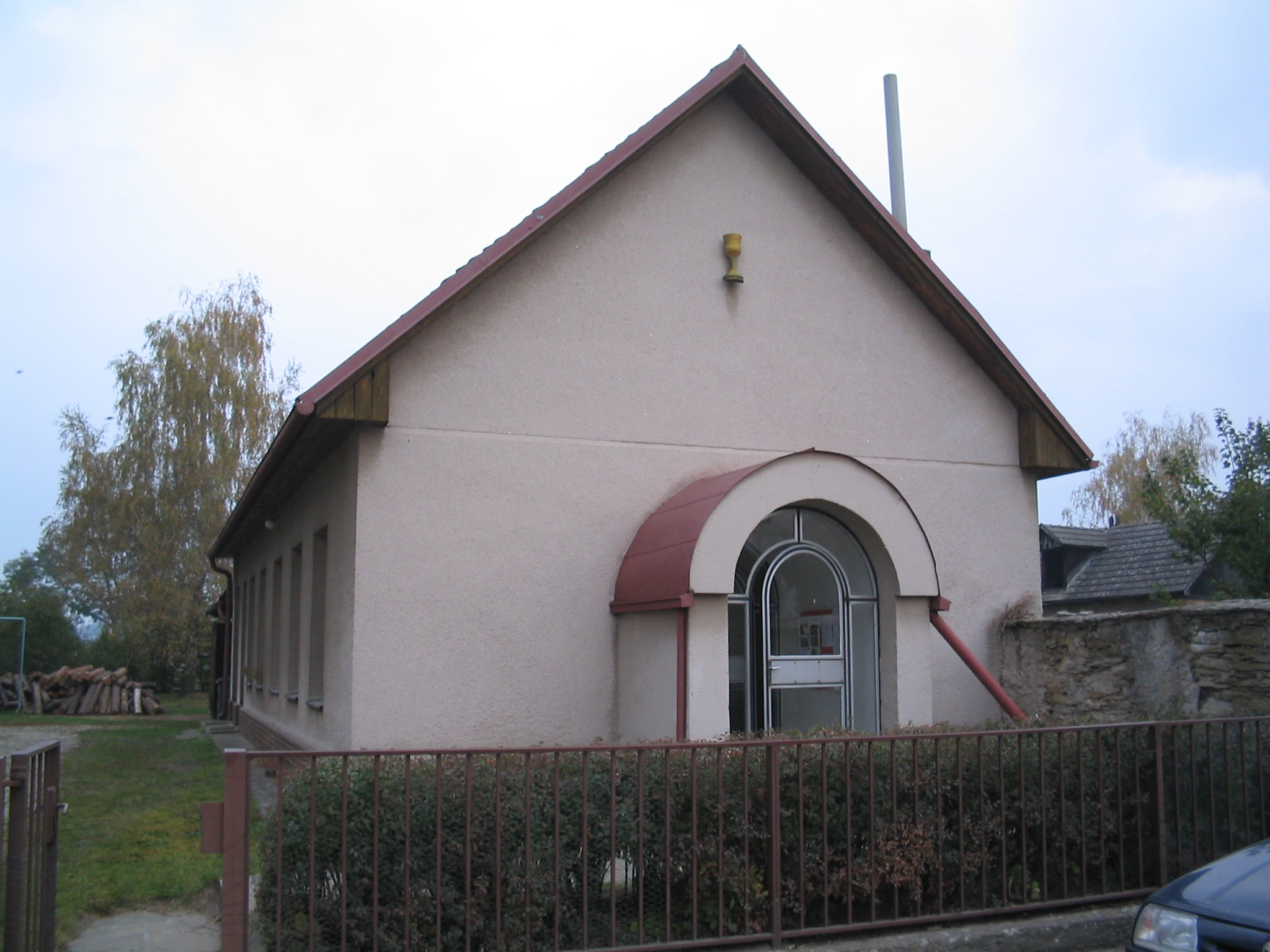 Modlitebna ČCE v Klášteře nad Dědinou (ČR)